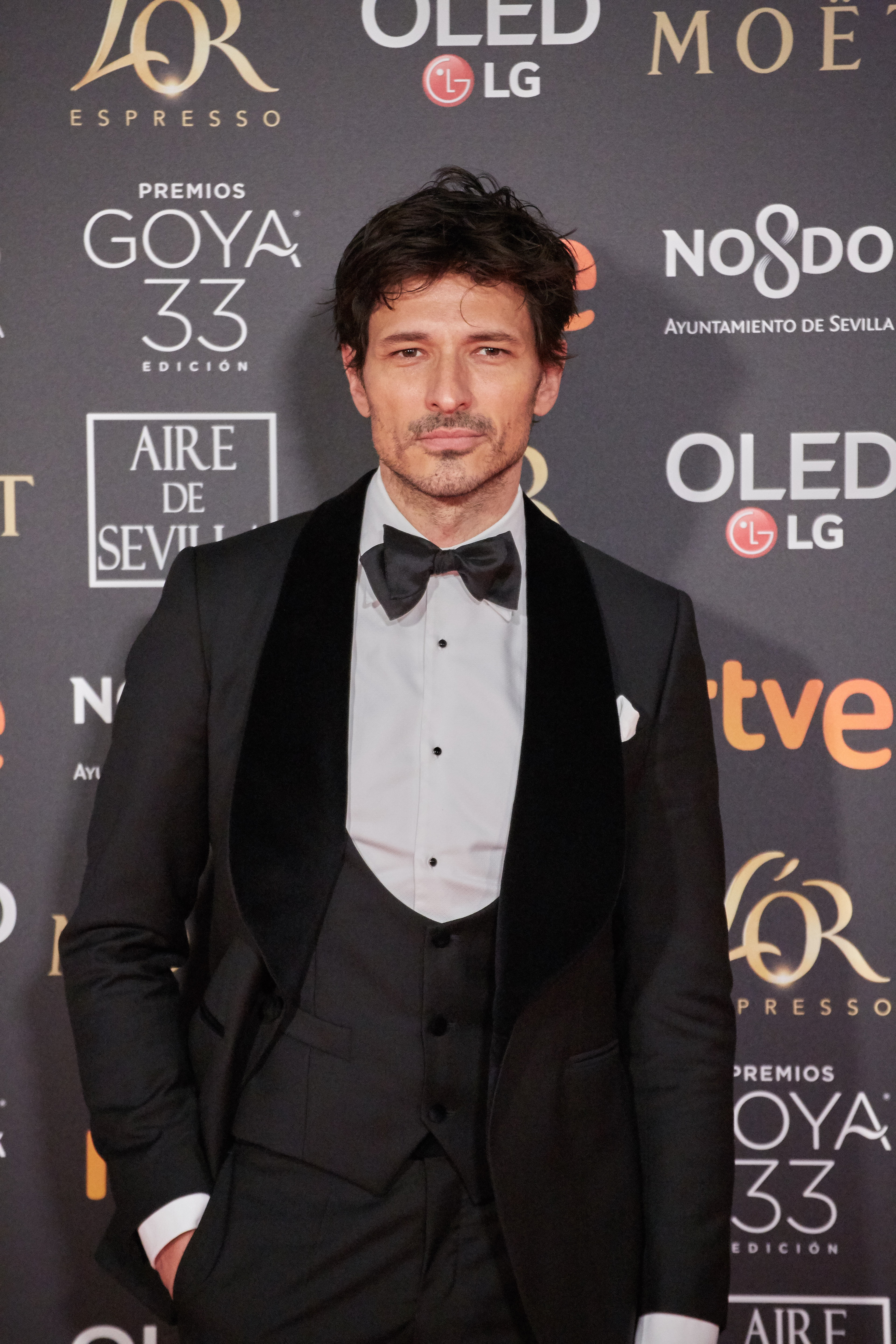 Andrés Velencoso en la alfombra roja de los Premios Goya celebrados en Sevilla en Febrero 2019